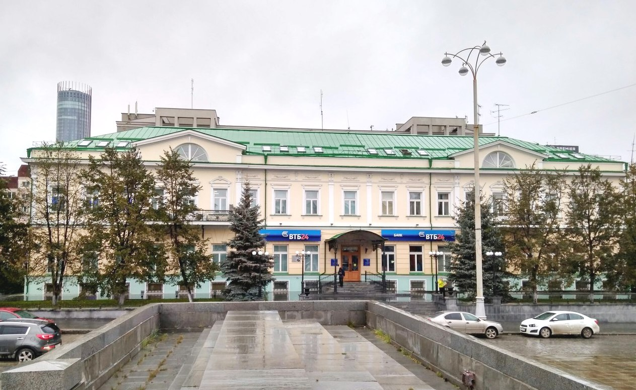 Здание Сибирского торгового банка (конспиративная квартира Я.М. Свердлова в 1905 году): проспект Ленина, 27, Екатеринбург, Свердловская область